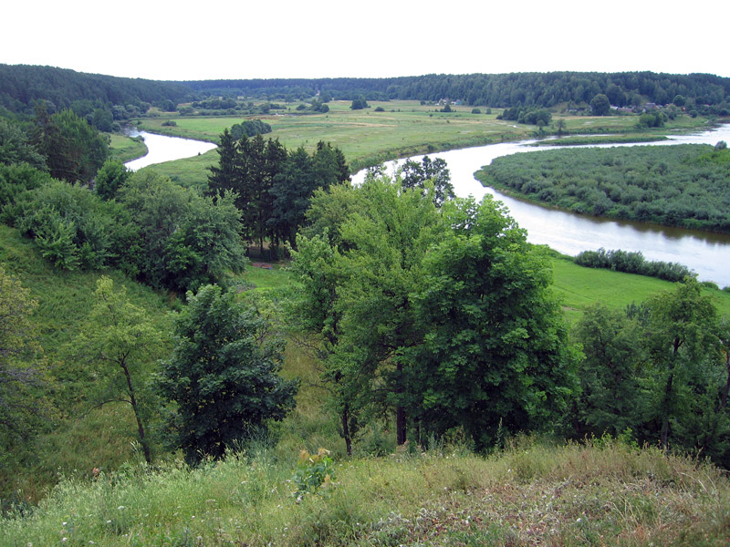 Nemuno ir Merkio santaka